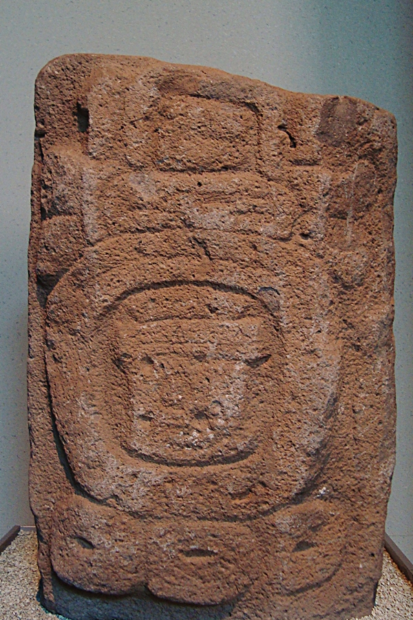 Estela ñuiñe. Se trata de un bajorrelieve en piedra con una inscripción calendárica. Procede de Huajuapan de León (México), estilo ñuiñe, período Clásico (ss. II-VII/VIII d. C.). Colección del MNA.